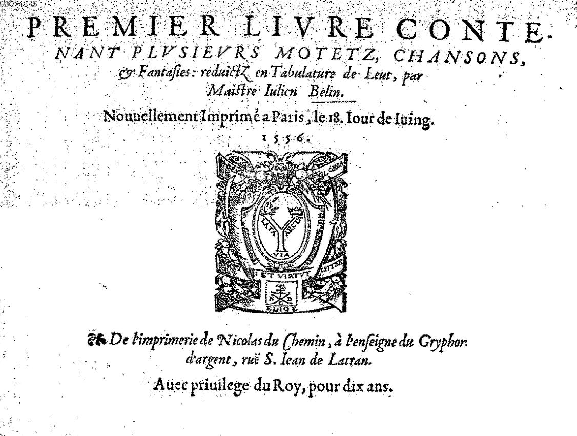 Title page of Julien Belin's "Premier livre contenant... tabulature de luth" (Paris, 1556)